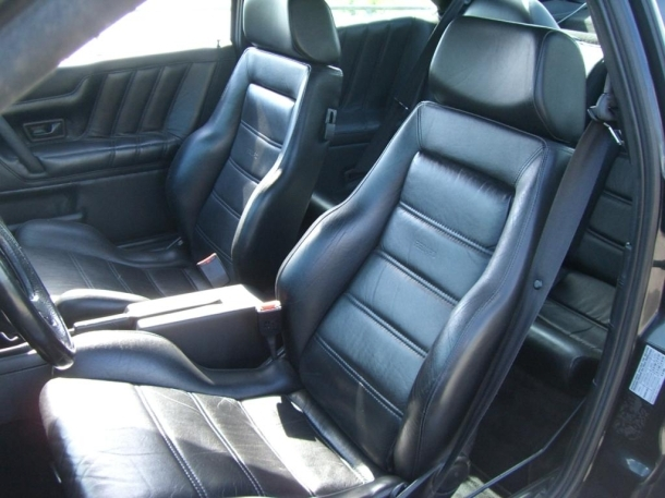 Vollleder eRecaro Corrado VR6